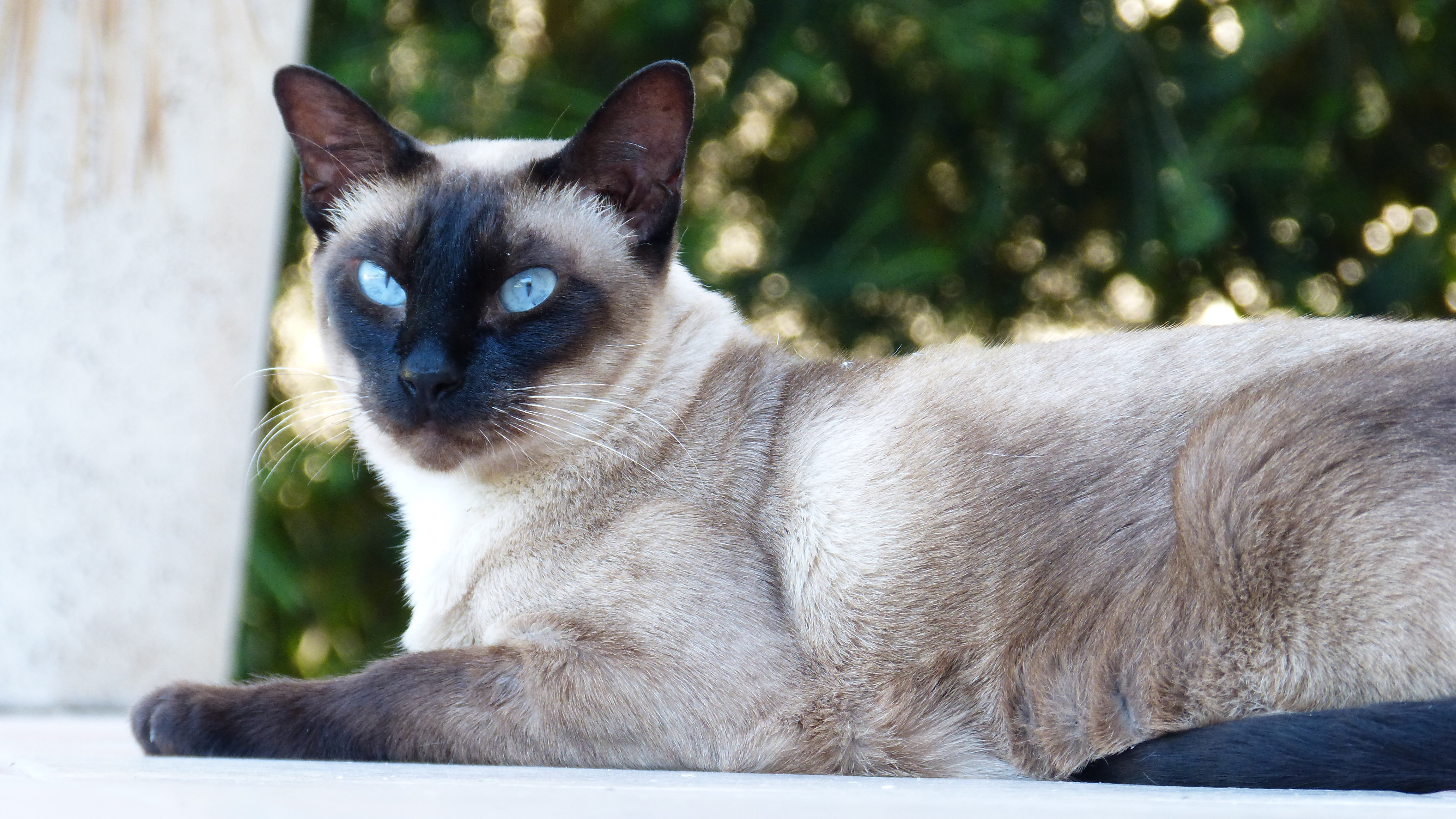 gata siamesa seal point